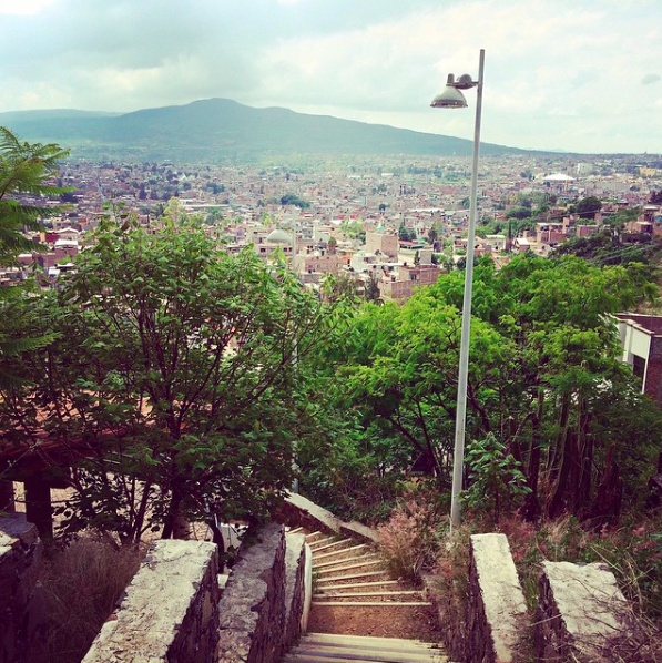 Vista de la ciudad de Uriangato desde el Mirador